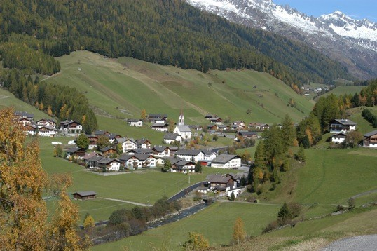 Blick auf Prettau